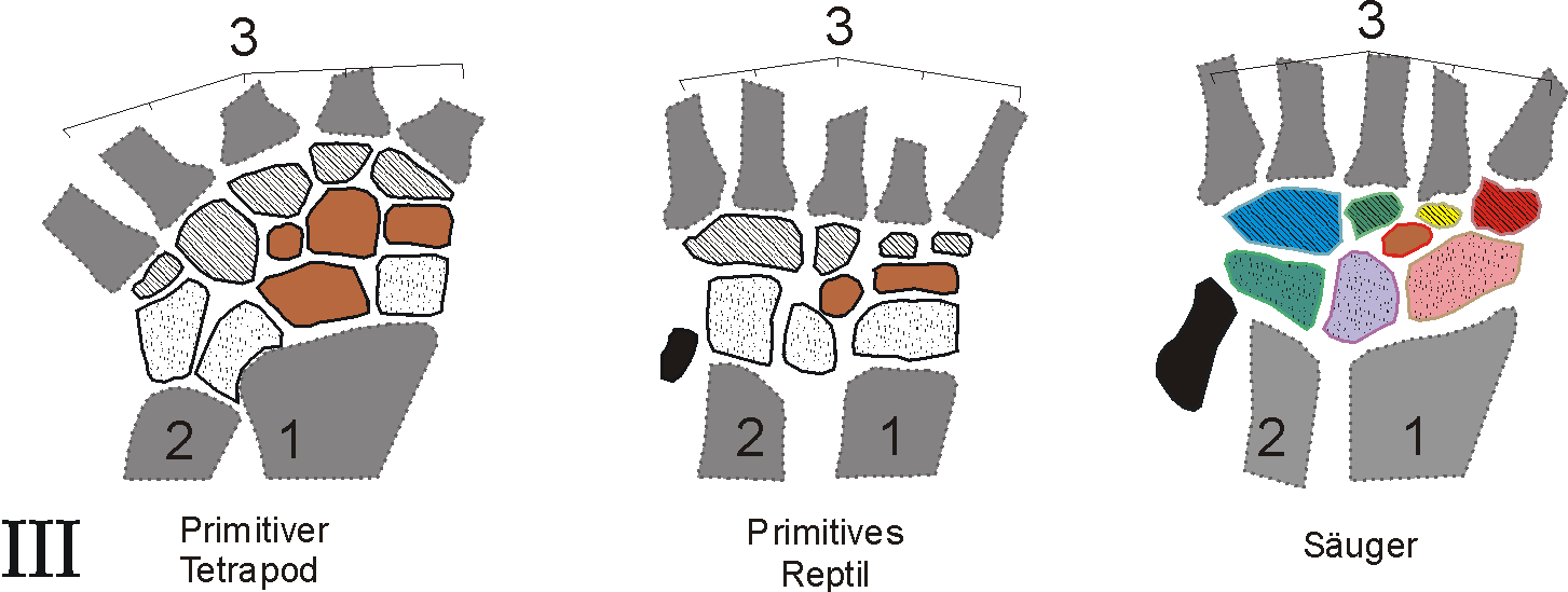 Handgelenk Schema Entwicklung